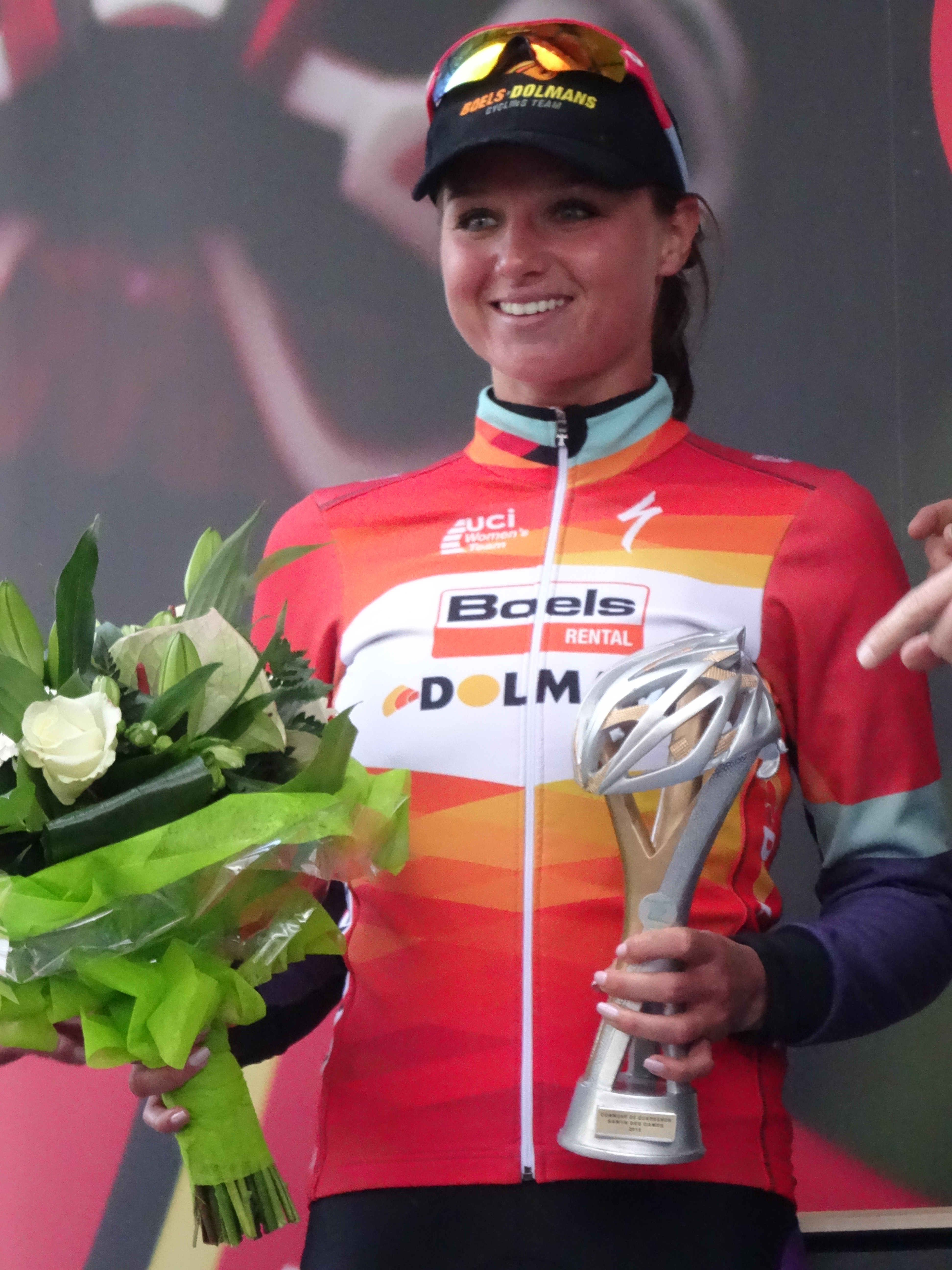 Reportage réalisé le mercredi 4 mars à l'occasion de l'arrivée du Samyn des Dames 2015 et du Samyn 2015 à Dour, Belgique.